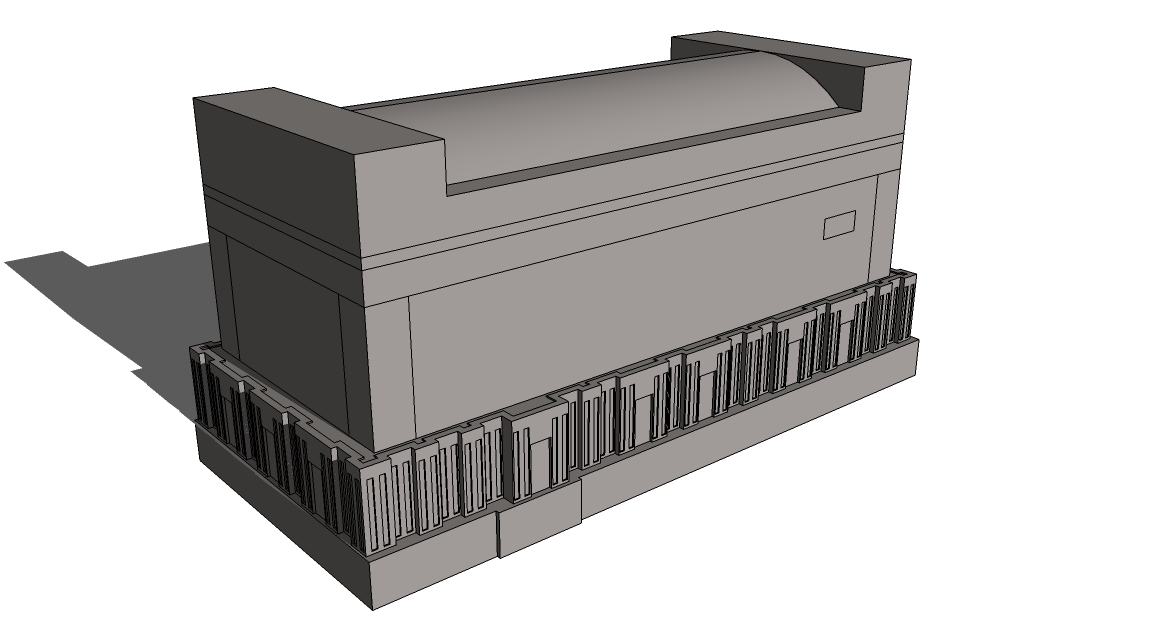 restitution du sarcophage d'amenemhat III à Dahchour